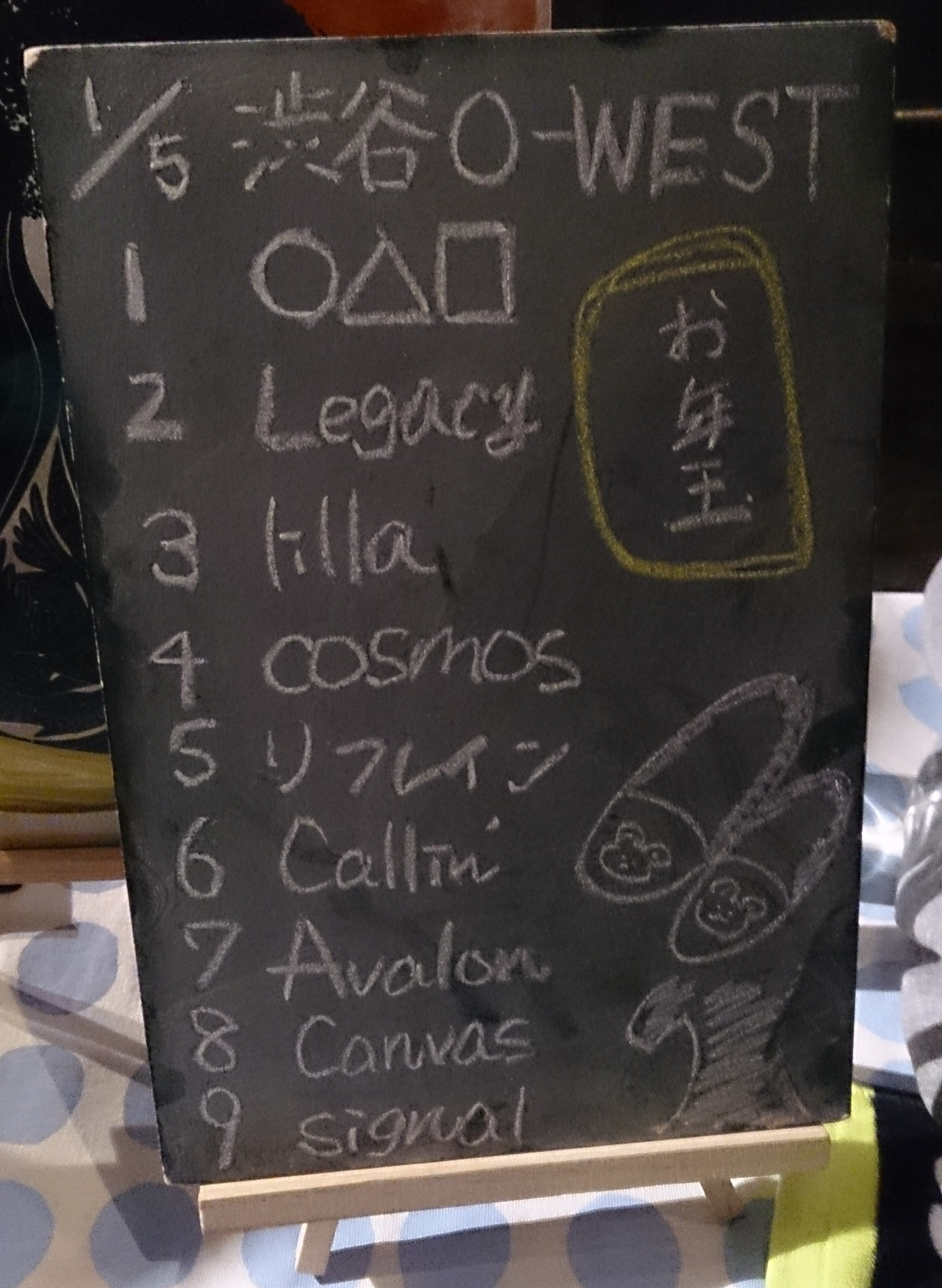 amiinAセトリボード(20180105(1))